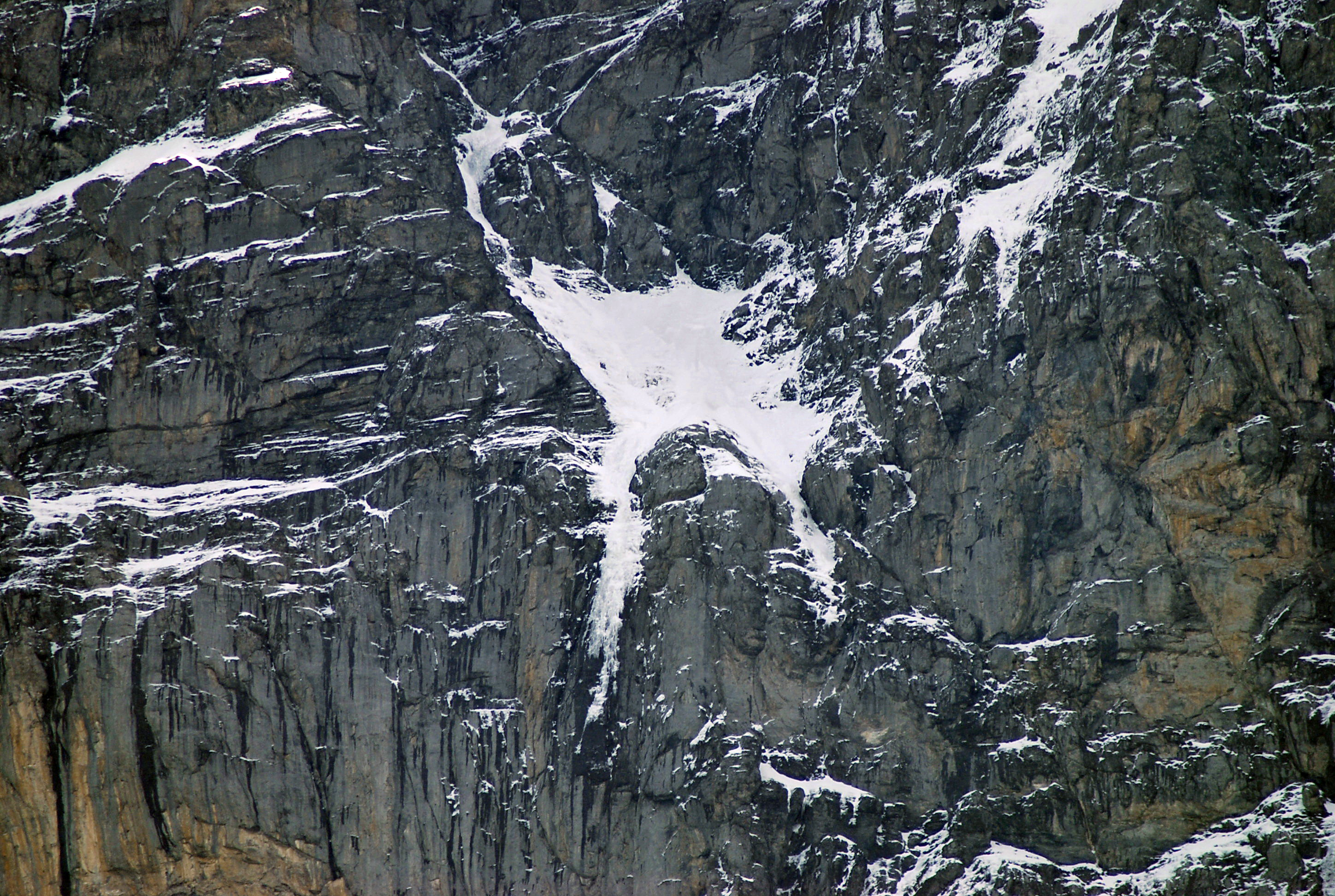 Die Weisse Spinne, eine bekannte und gefährliche Passage bei der Nordwanddurchsteigung. Titel des Eiger-Buches des Erstbesteigers Heinrich Harrer